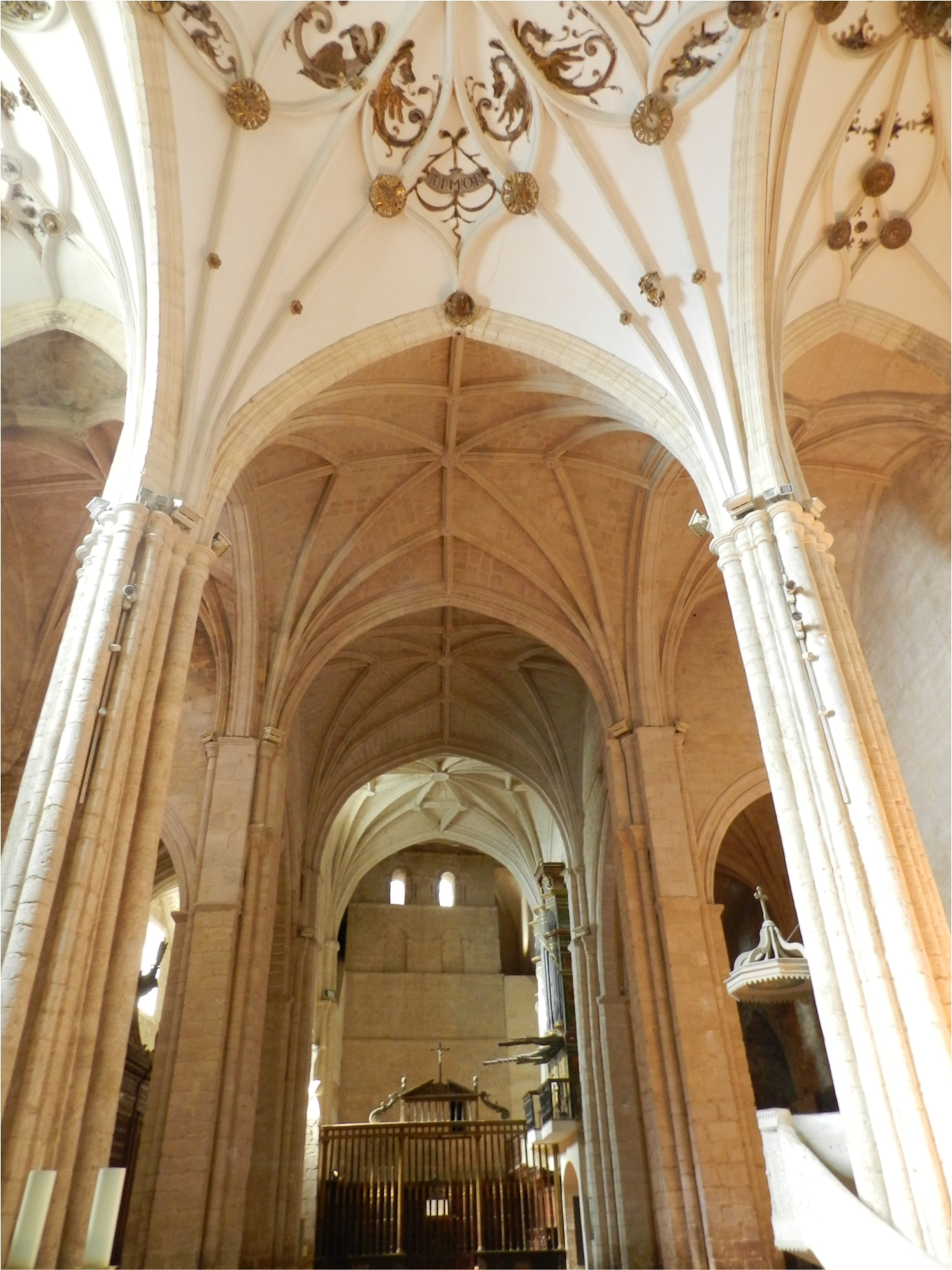 Interior de la Iglesia. Torre románica, nave gótica y ábside gótico-flamígero.